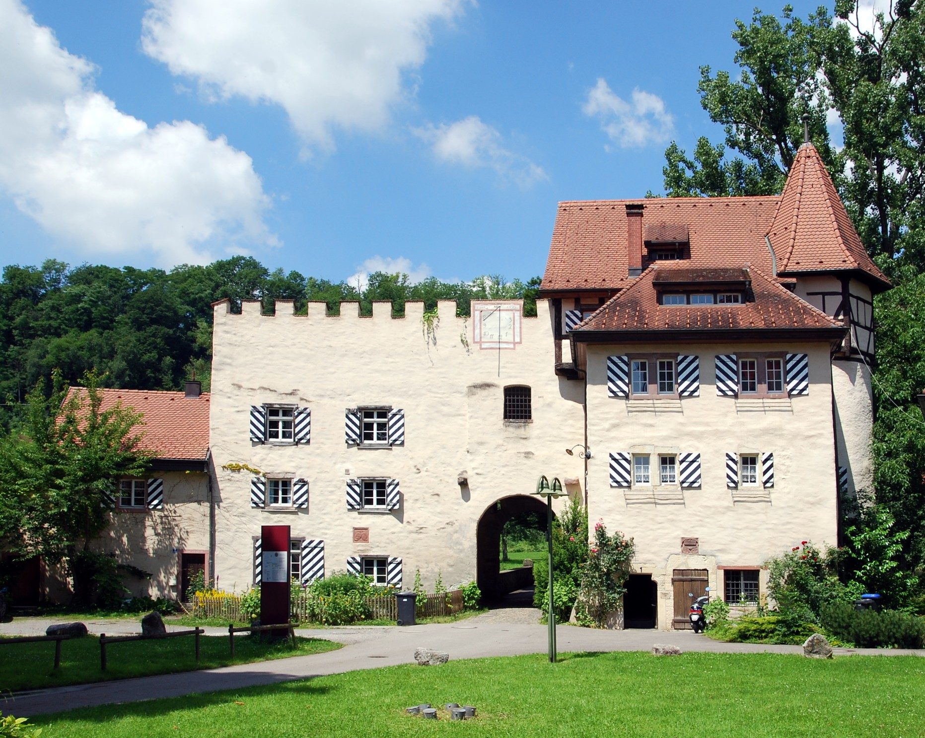 Schloss Beuggen: Torhaus